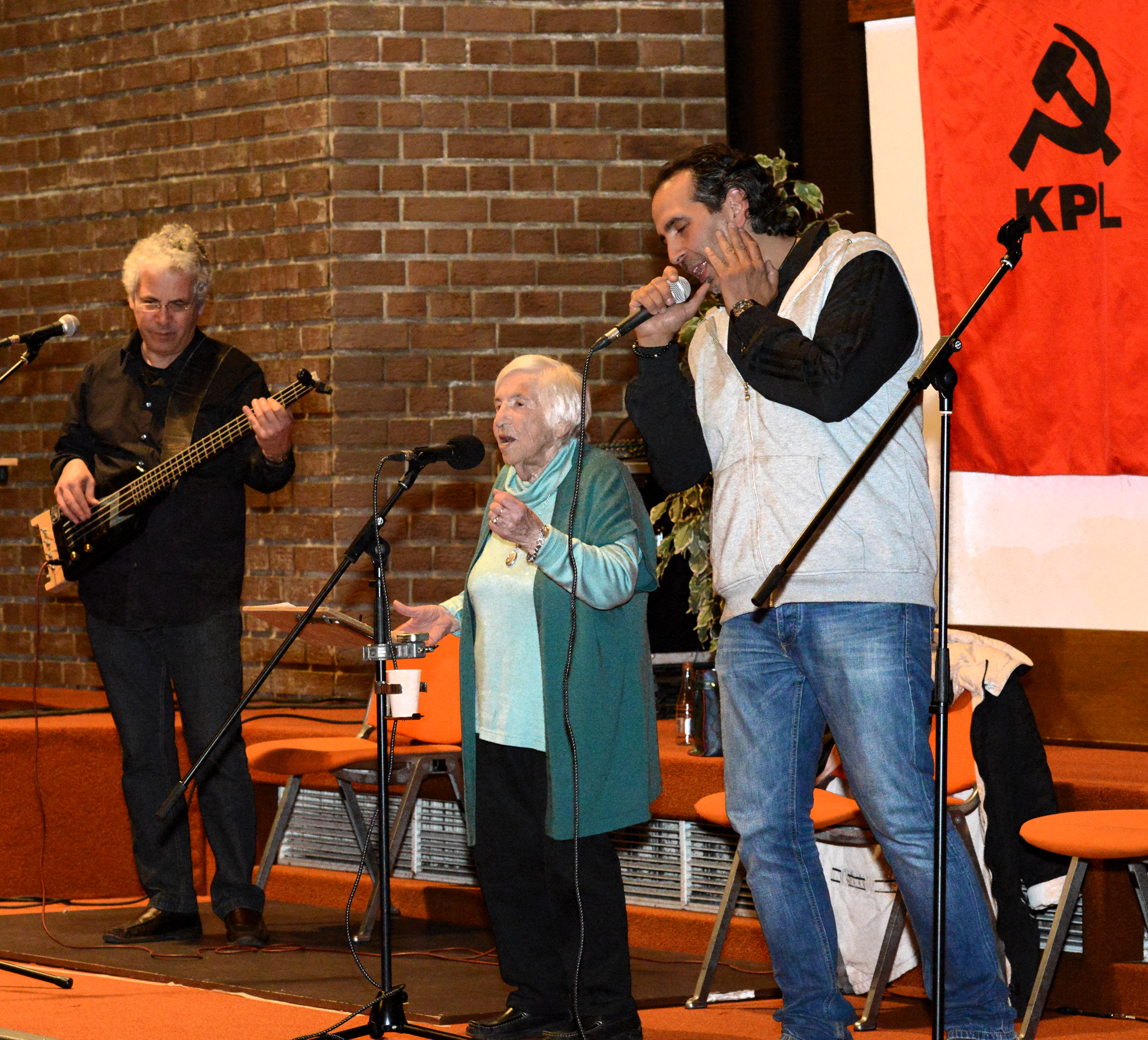 Den 29. Abrëll 2015 hat d'Kommunistesch Partei Lëtzebuerg op en Owend zum Thema 70 Joer Befreiung vum Faschismus agelueden.Am Kulturzentrum Marcel Noppeney zu Uewerkuer ass déi bekannt antifaschistesch Aktivistin Esther Bejarano zesumme mat hirem Jong Joram an dem Rapper a Sozialaarbechter Kutlu Yurtseven vu Microphone Mafia opgetrueden. De Joram an d'Esther Bejarano zesumme mam Kutlu Yurtseven.